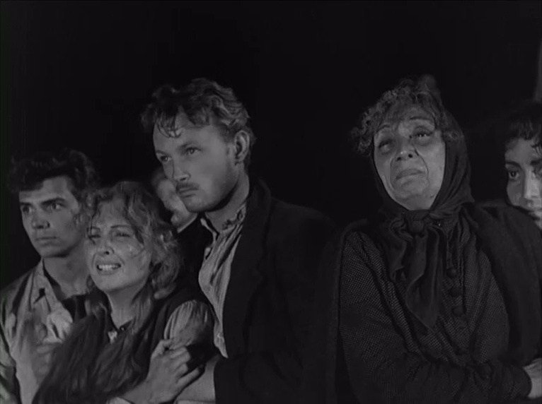 Scena del film Il mulino del Po (1949)